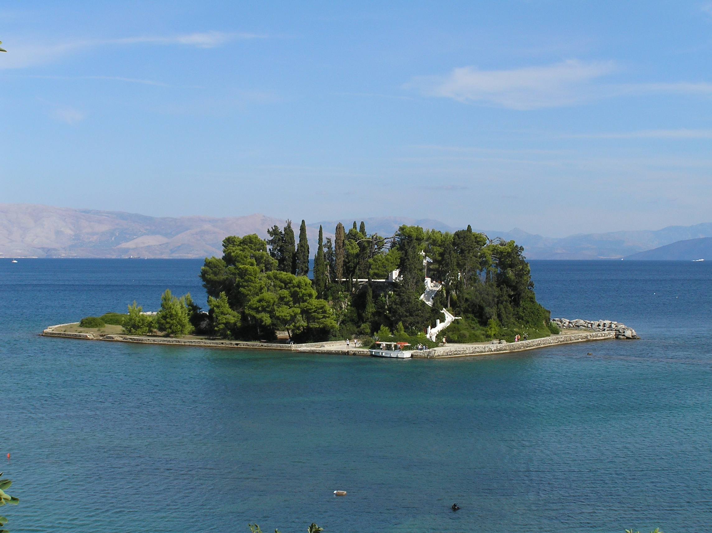 Ποντικονήσι